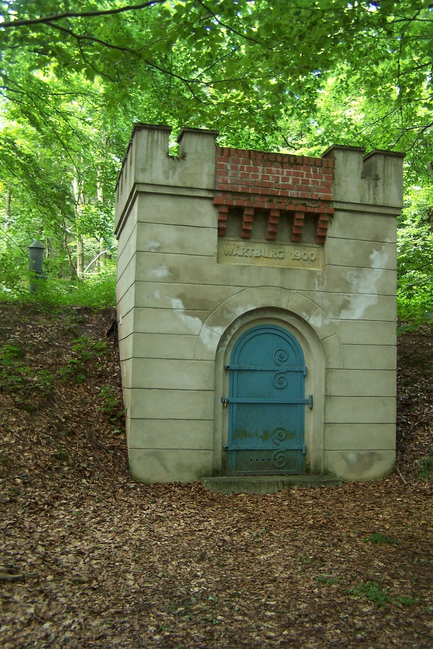 Teilansicht des Gebäudes.